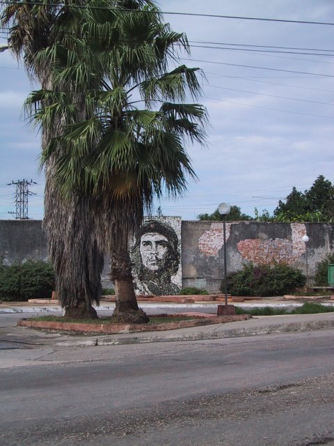 Bild von Matanzas/Kuba